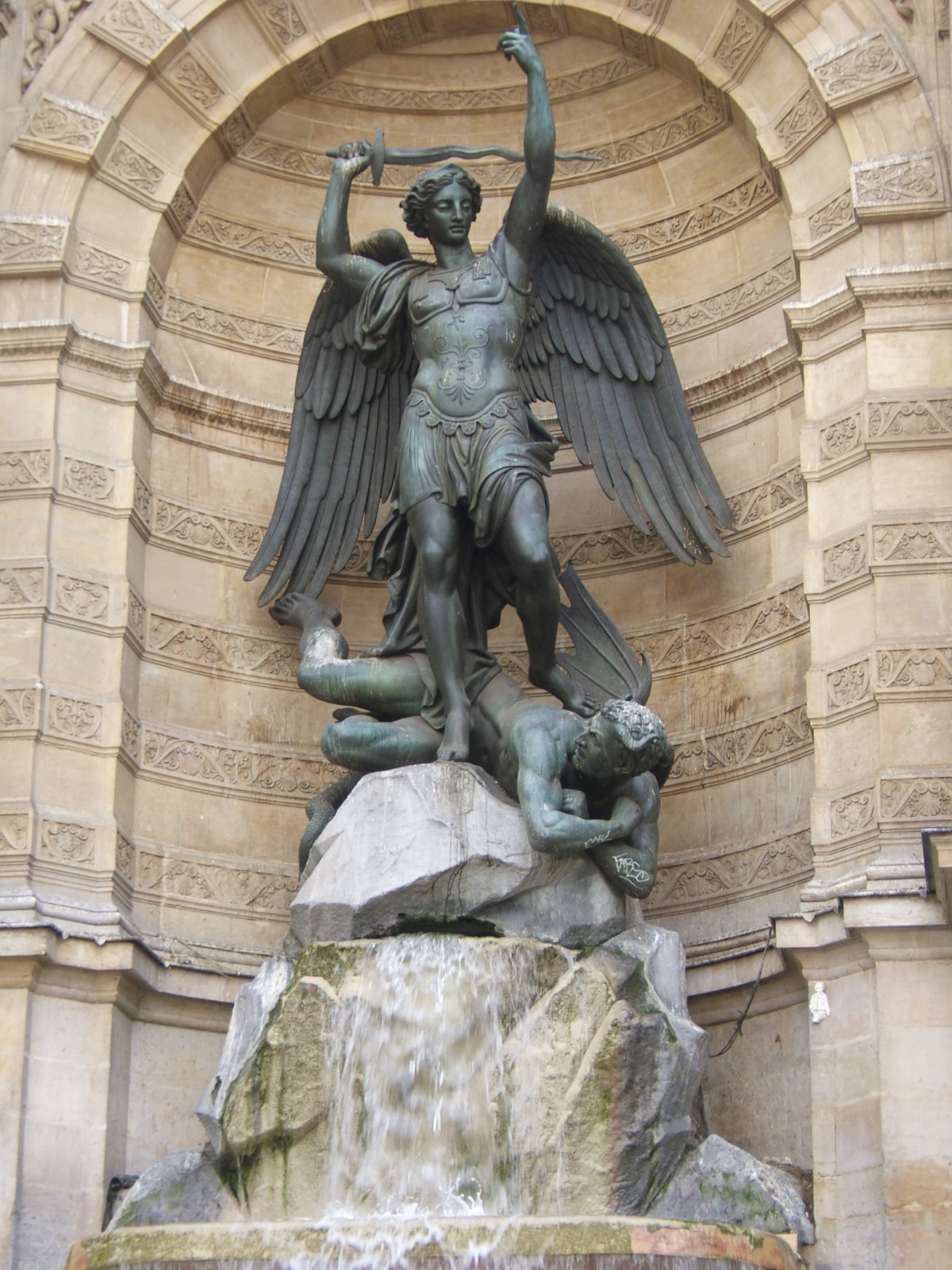 Fontaine Saint-Michel (Paris, France)